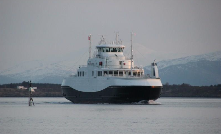 MF Tenna i Herøysundet